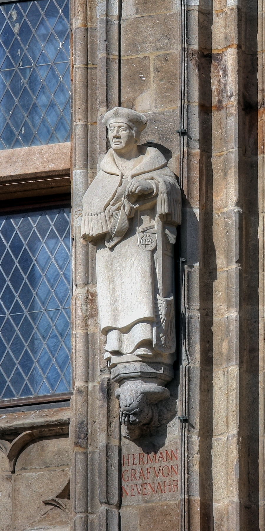 Figur des Grafen Hermann von Neuenahr (1492-1530). Thema der Konsole unter der Neuenahr-Statue: „Dr. Bernd Ernsting“ (* 1956, Kunsthistoriker). Bildhauer: Heribert Calleen